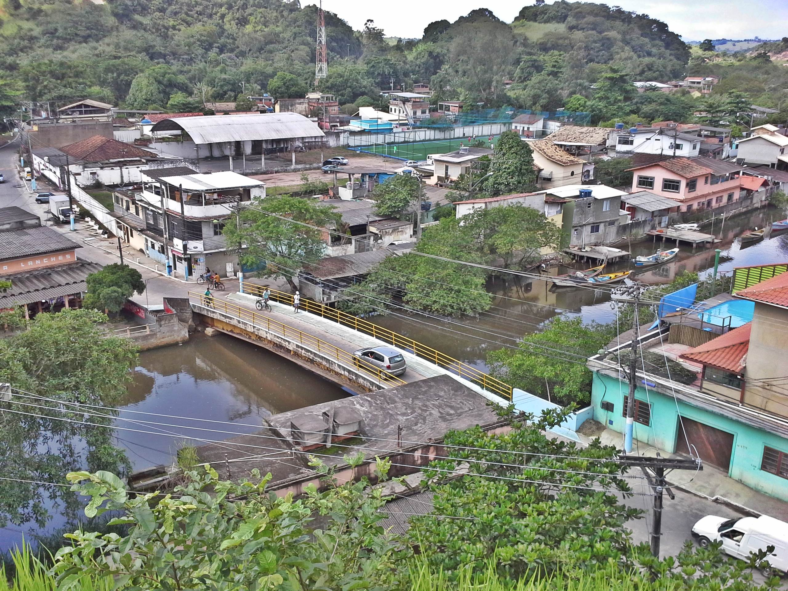 Surui